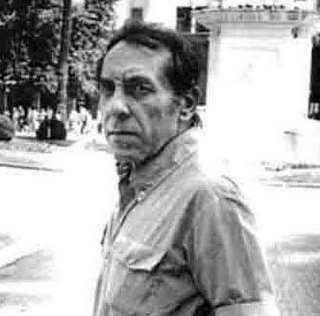 retrato